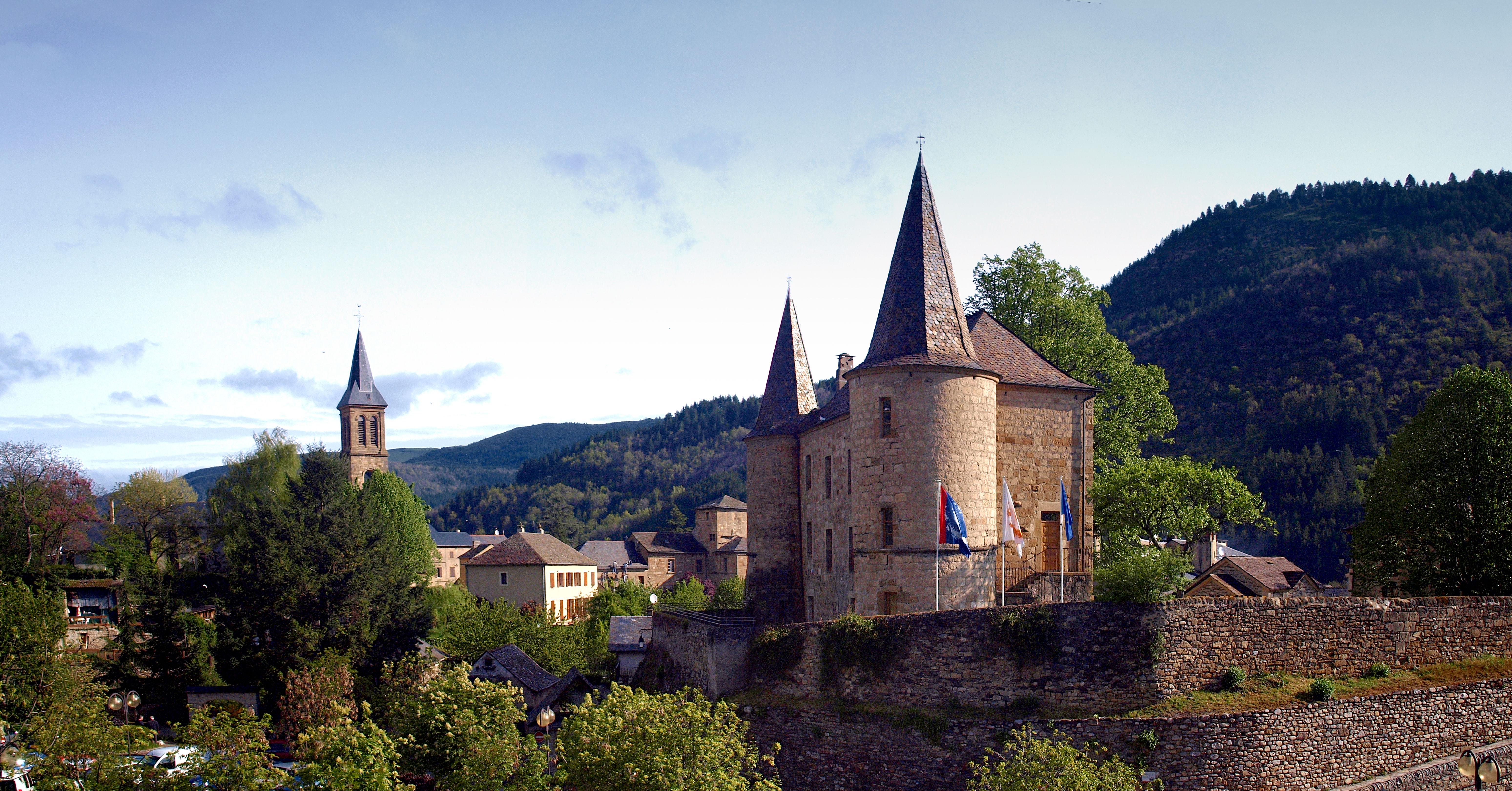 Florac (Lozère) - Panorama du château à l'église